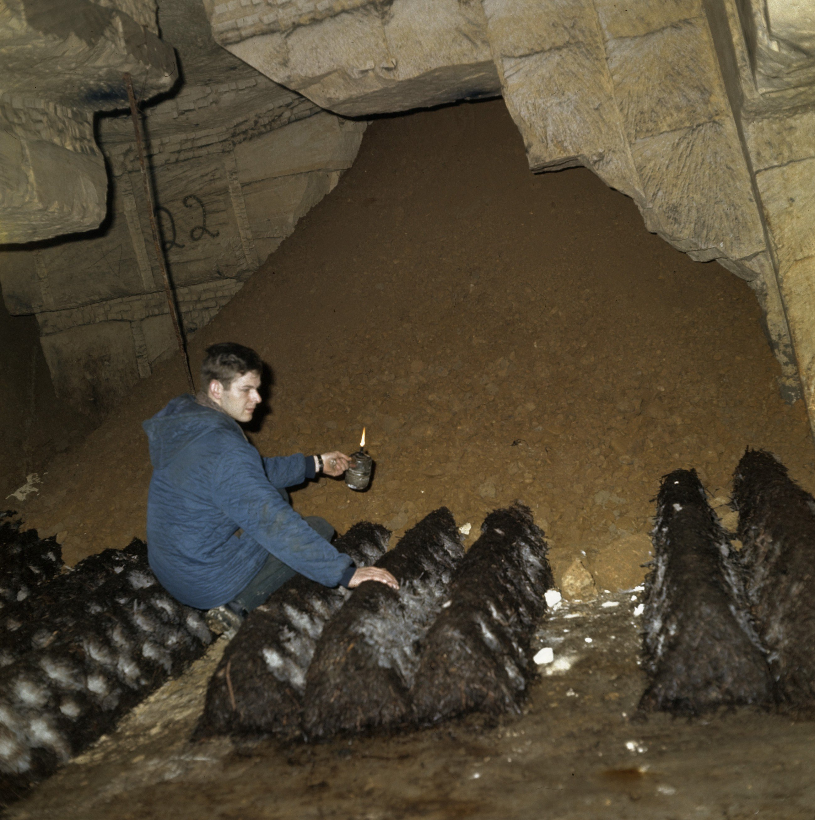 Collectie / Archief : Fotocollectie Anefo Reportage / Serie : [ onbekend ] Beschrijving : Champignonkwekerij in de grotten Datum : ongedateerd Trefwoorden : grotten, kwekerijen Persoonsnaam : champignons Instellingsnaam : diapositief 6x6 kleur Fotograaf : Fotograaf Onbekend / Anefo Auteursrechthebbende : Nationaal Archief Materiaalsoort : Dia (kleur) Nummer archiefinventaris : bekijk toegang 2.24.01.07 Bestanddeelnummer : 254-7619